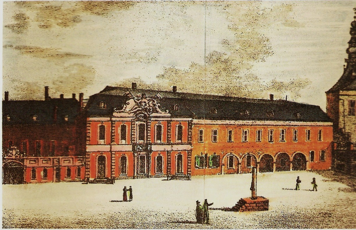 colorierte Graphik des Katschhofes in Aachen mit Gerichtsgebäude und Komödienhaus